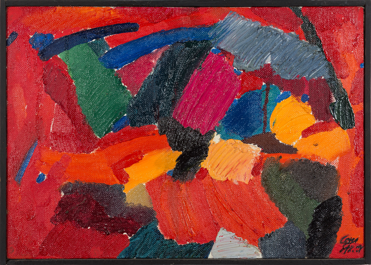 Sonia Jakuschewa, Počátek podzimu, 1993, olej, plátno, 35 x 50 cm, foto Dirk Eisermann